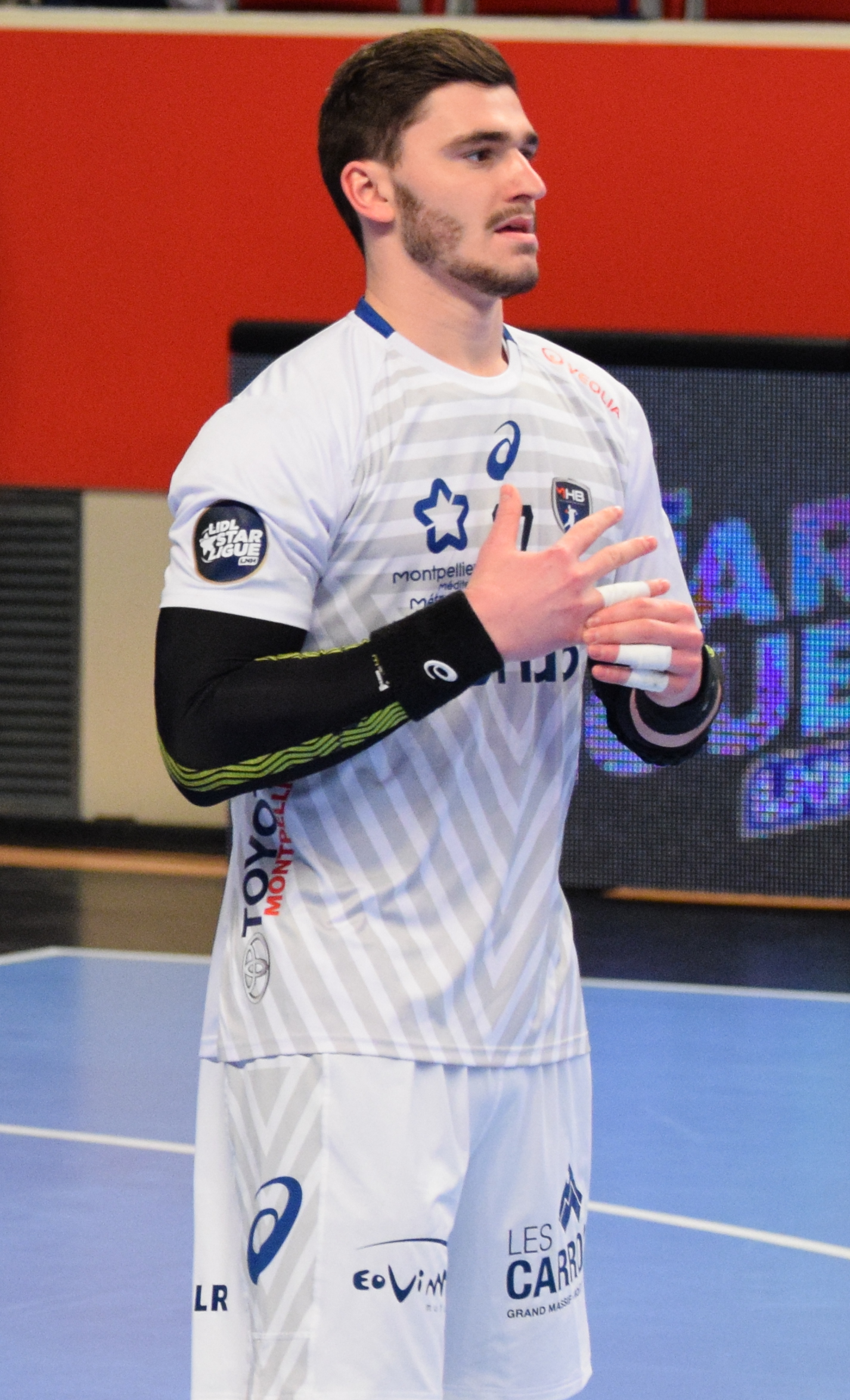 Rencontre de championnat entre le PSG et Montpellier. A Coubertin, le 1er mars 2018.